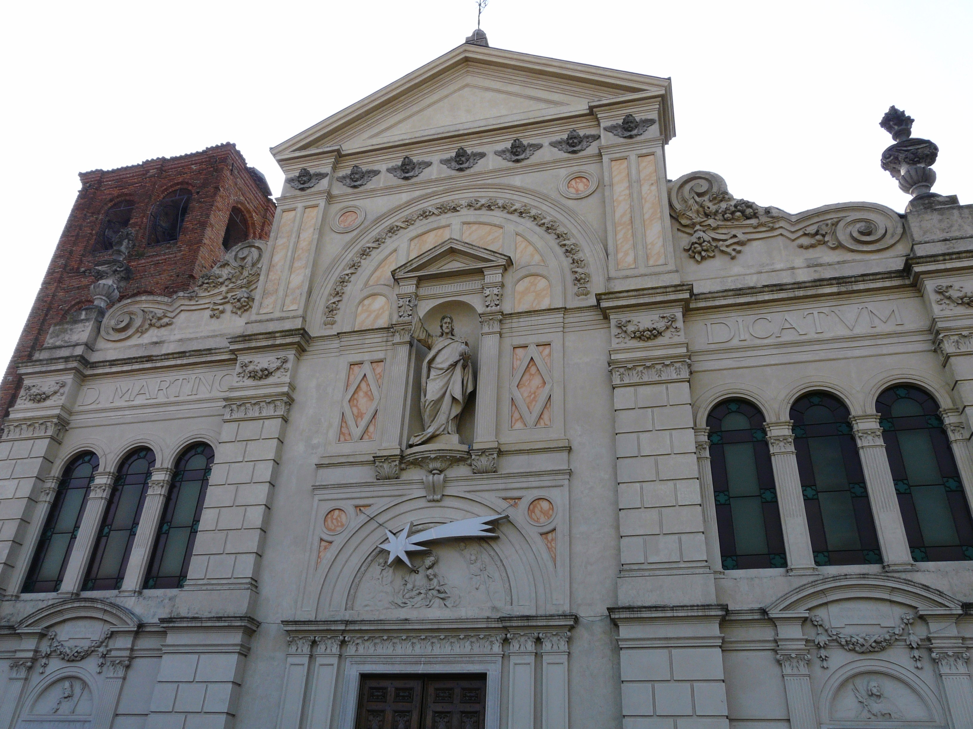 Facciata della chiesa di San Martino, San Salvatore Monferrato, Piemonte, Italia